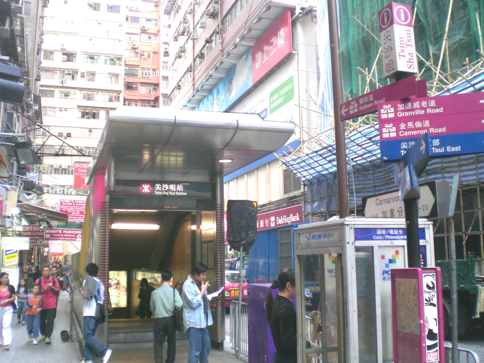 九龍尖沙咀尖沙咀站D2出口, 加拿分道, Carnarvon Road, TST, Hong Kong